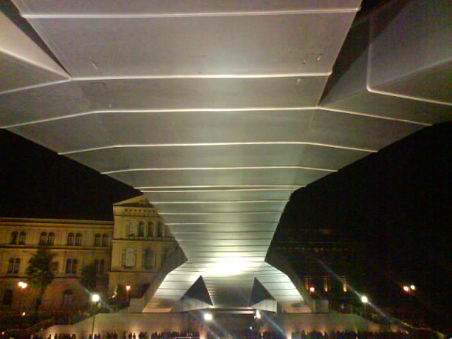 Pasarela Padre Arrupe (Bilbao)